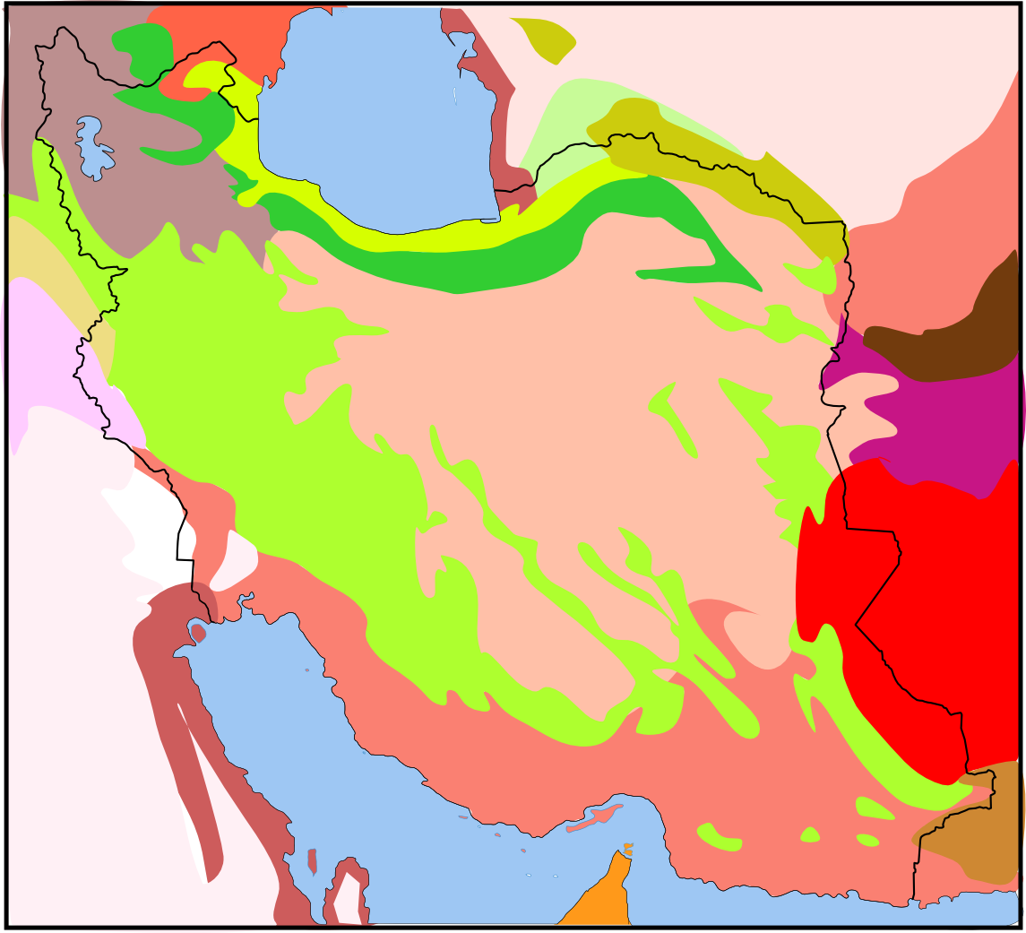 Biotopes of Iran (and around) - approximative limits Central Persian desert Basin/Bassin central désertique Forest steppe/Steppe arborée Eastern anatolian forest steppe/Steppe arborée de l'est de l'anatolie Elbourz forest steppe/Steppe arborée de l'elbourz Hyrcanian caspian forests/Forêts hyrcaniennes de la caspienne Kopet Dag forest steppe/Steppe arborée du Kopet Dag Kopet Dag semi desert/Semi-désert du Kopet Dag Desert caspian lowlands/plaines désertiques de la caspienne Azerbaijan steppe/Steppe de l'azerbaïdjan Middle East steppe Mesopotamian desert/désert Mésopotamien Arabian desert/désert arabe Tigris-Euphrates salted alluvial marshes/marais saumâtres alluviaux du Tigre et de l'Euphrate Persian gulf desert/Désert du golfe Persique South Persian desert and semi-desert/désert et zone semi-désertique du sud de l'Iran North Pakistan sandy desert/désert sableux du nord du Pakistan Central Afghan woodlands/Terrains arborés du centre de l'Afghanistan Oman Gulf desert and semi-desert/désert et zone semi-désertique du Golfe d'Oman Baluchistan Woodlands